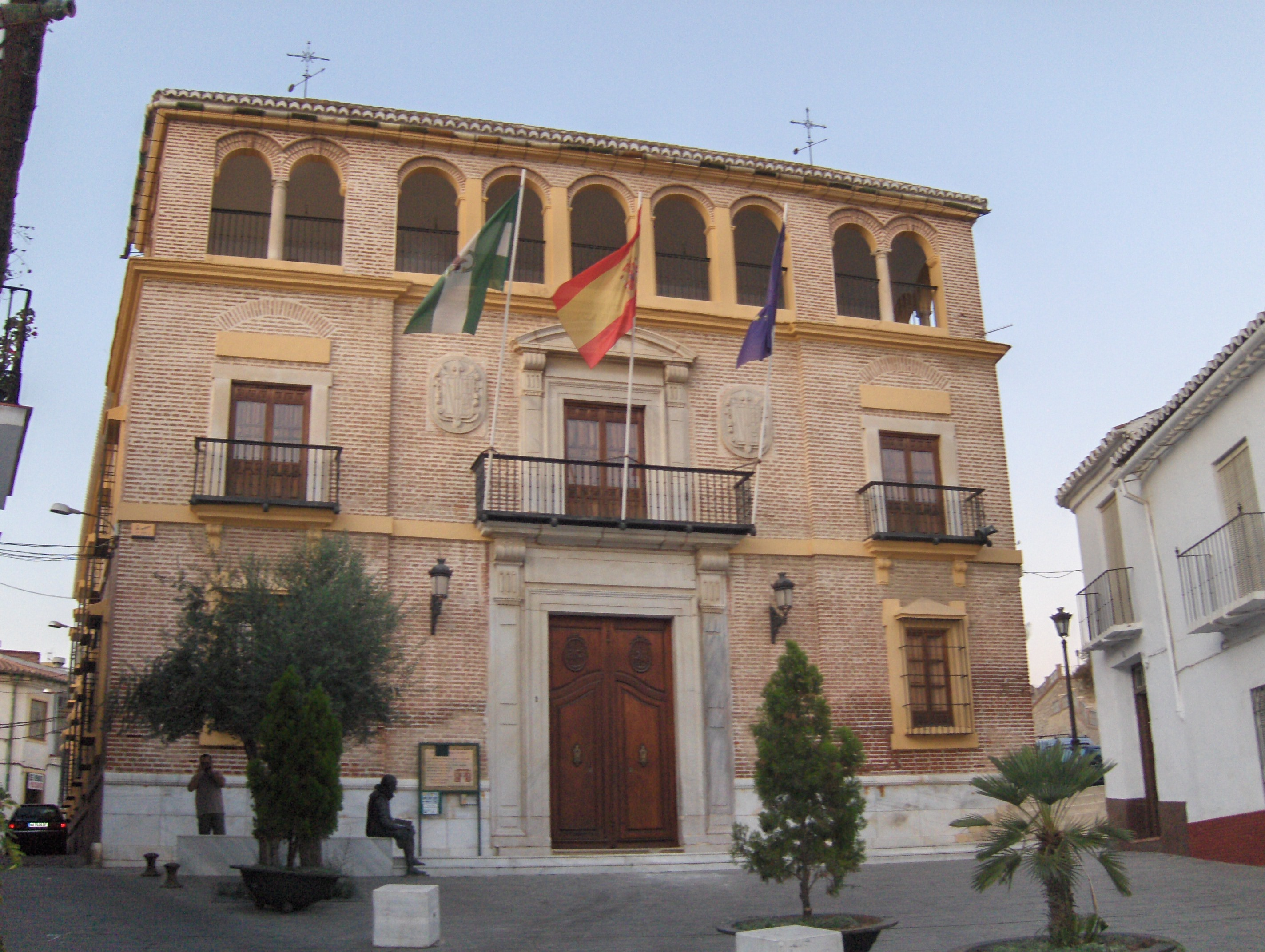 Palacio de Beniel, Vélez-Málaga, España.